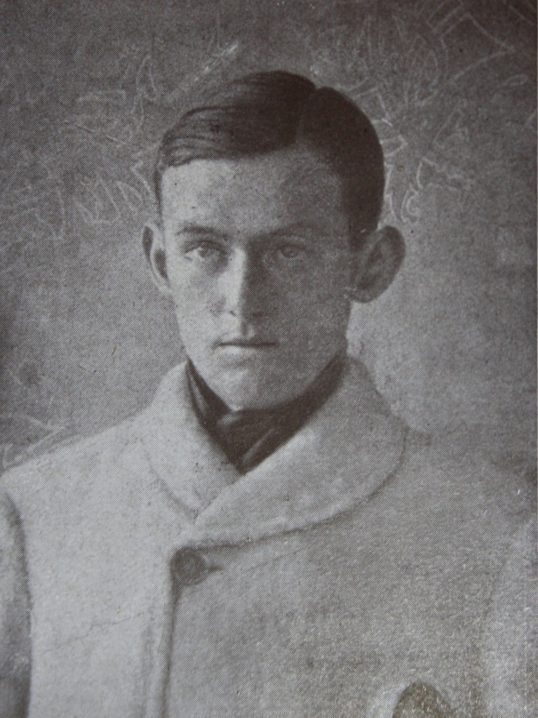 Zdeněk Žemla